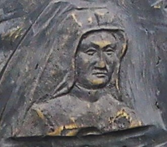 Tablica ku czci Marii Karłowskiej w Poznaniu, ul. Podgórna (dom, w którym mieszkała).